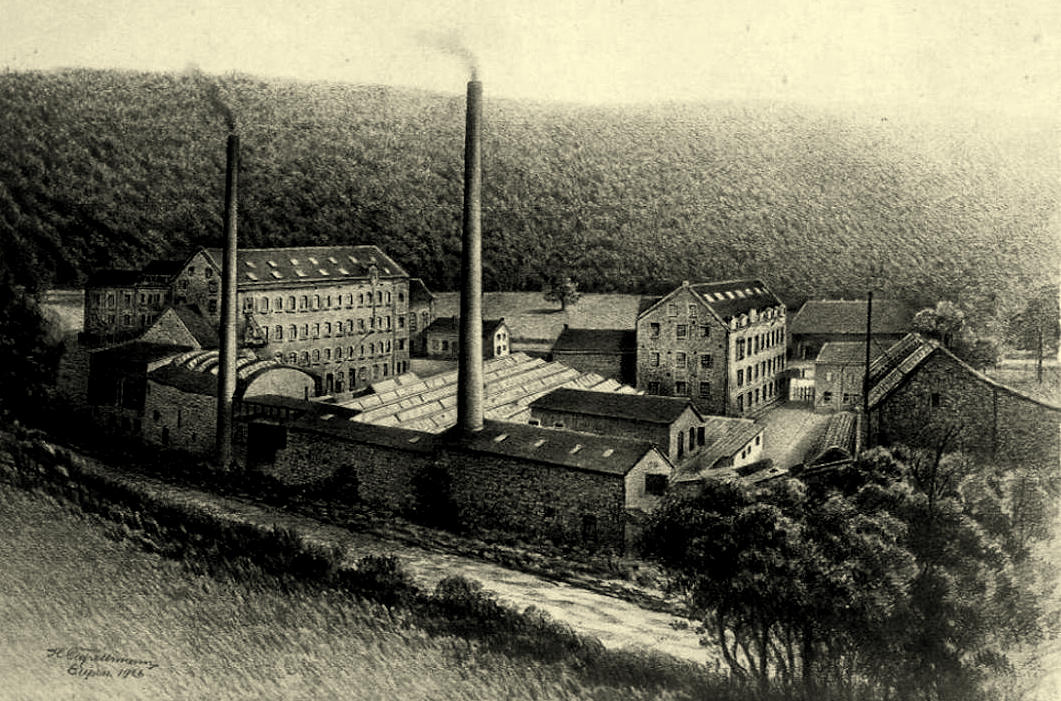 Tuchfabrik Gülcher & Sternickel im Ortsteil Hütte von Eupen, Ansicht um 1926